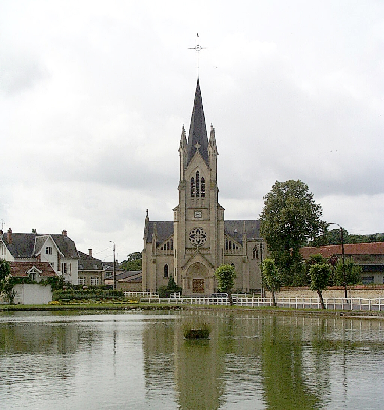 Bilder aus Gueux